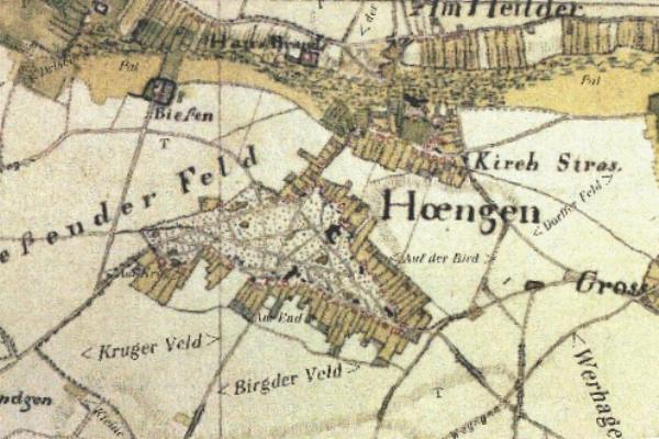 Kartenaufnahme der Rheinlande 1804/05